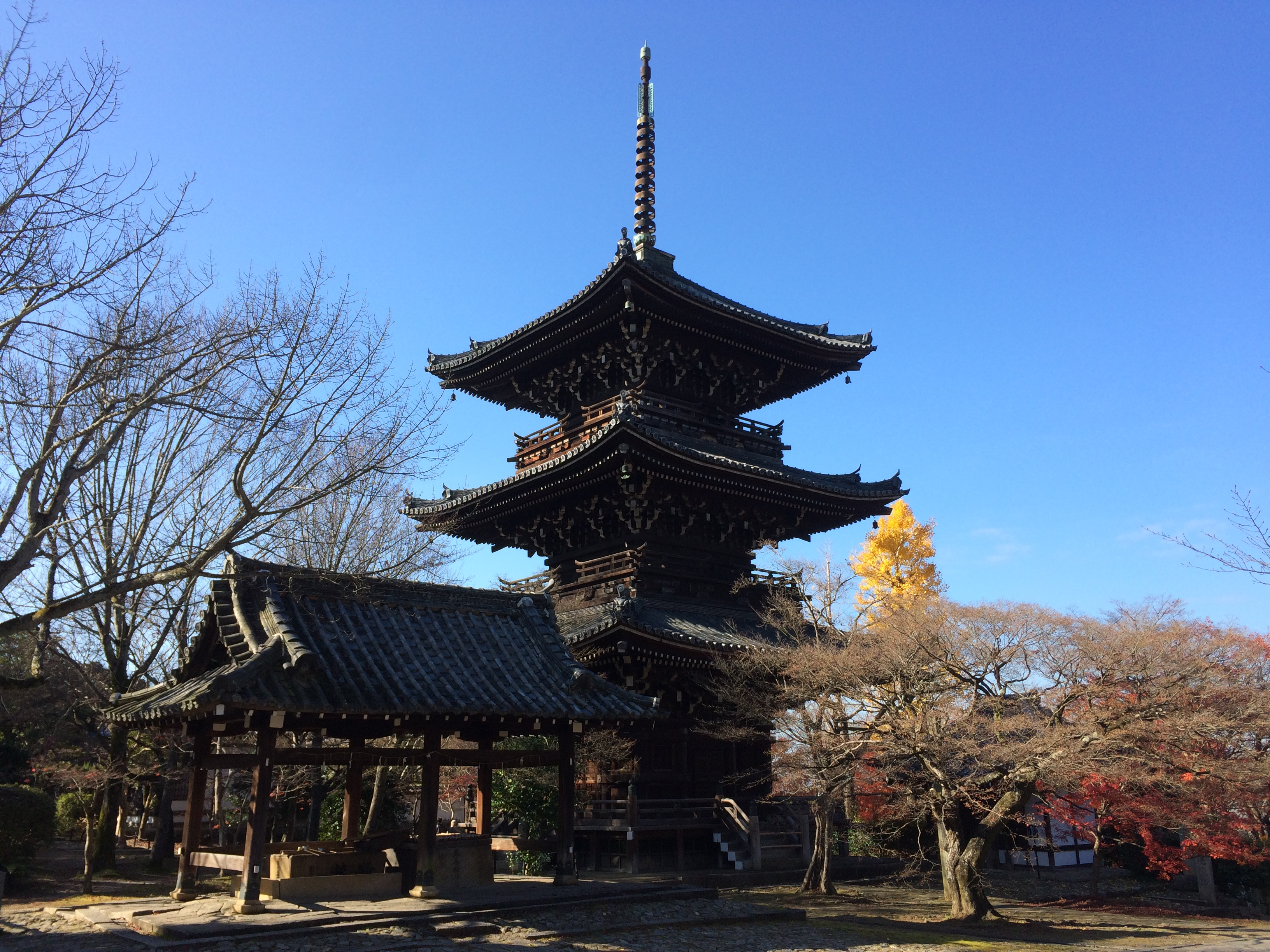 真正極楽寺三重塔